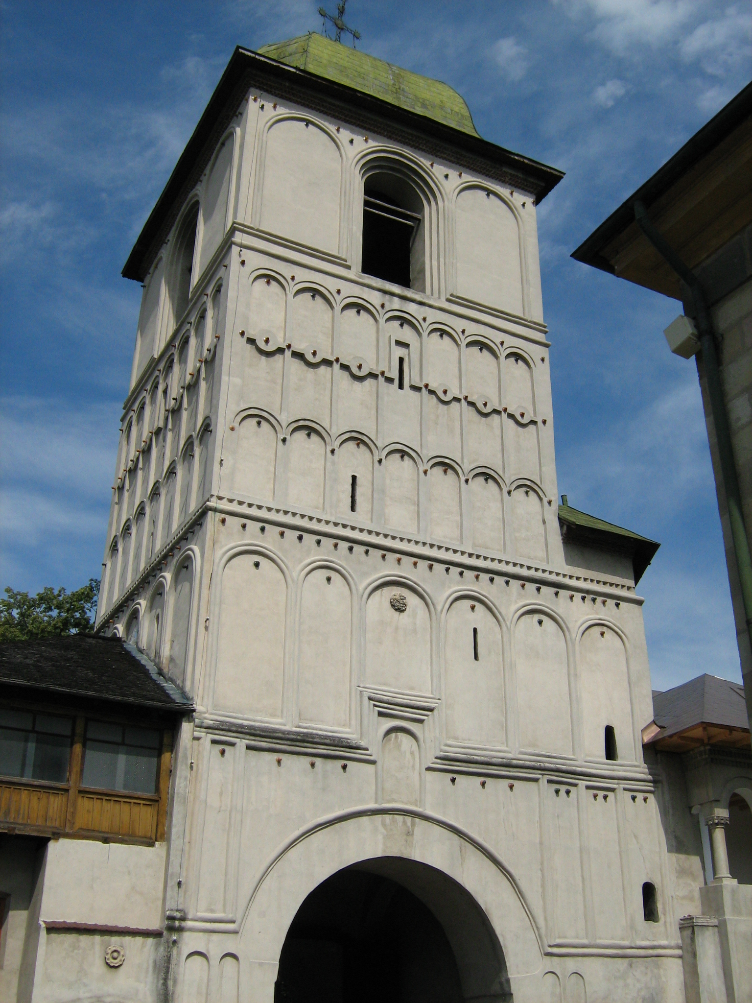 Intrarea in manastirea Negru Voda